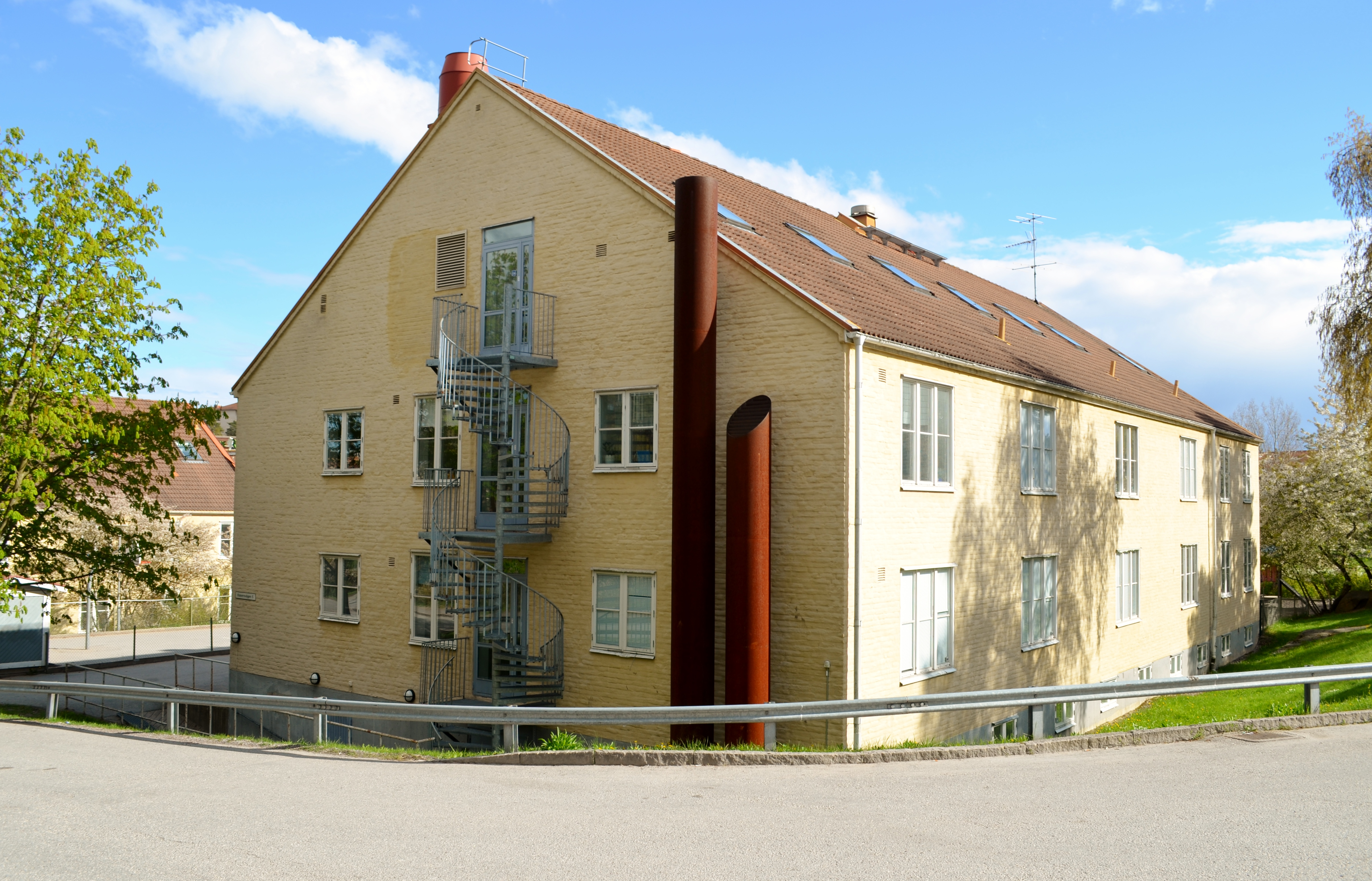 Före detta kasern vid Svea artilleriregemente i Rissne, Sundbyberg.